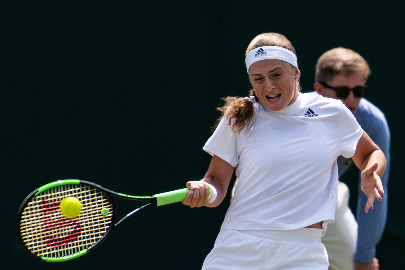 Jelena Ostapenko